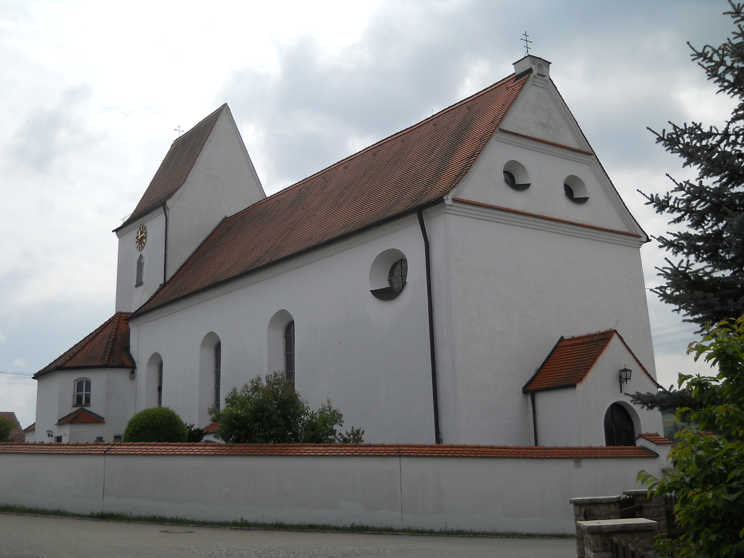 Daiting, Landkreis Donau-Ries, Bistum Augsburg, Pfarrkirche St. Martin, aus nordwestlicher Sicht